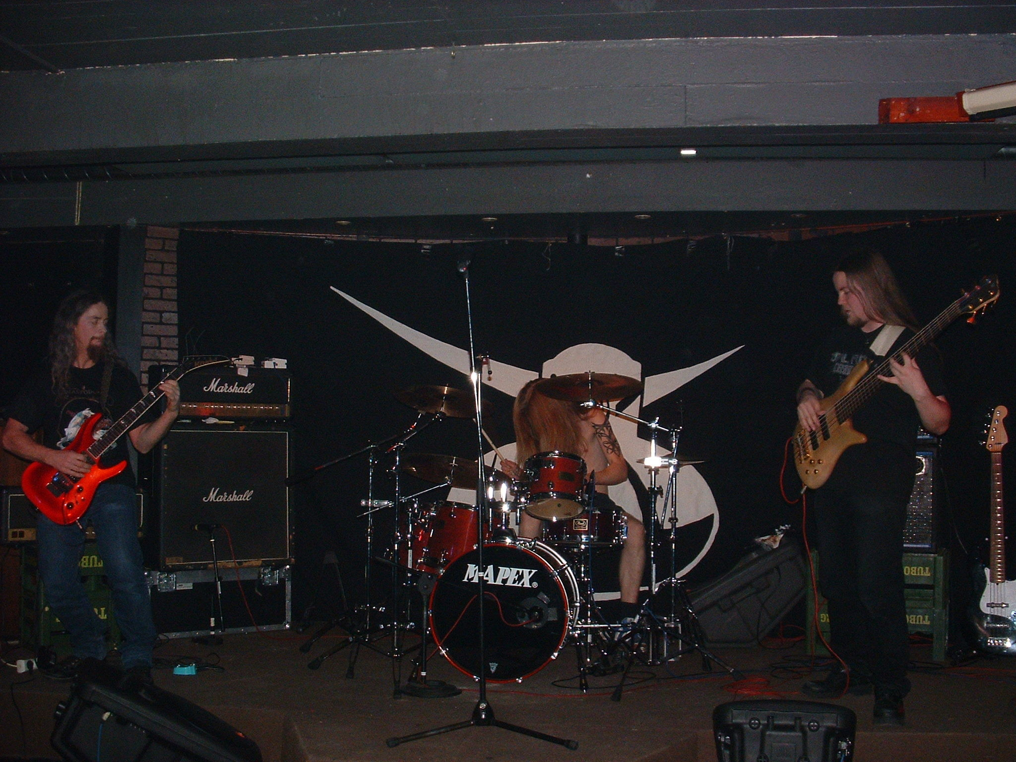 Hljómsveitin Dark Harvest á tónleikum í Hvíta húsinu á Selfossi árið 2003.